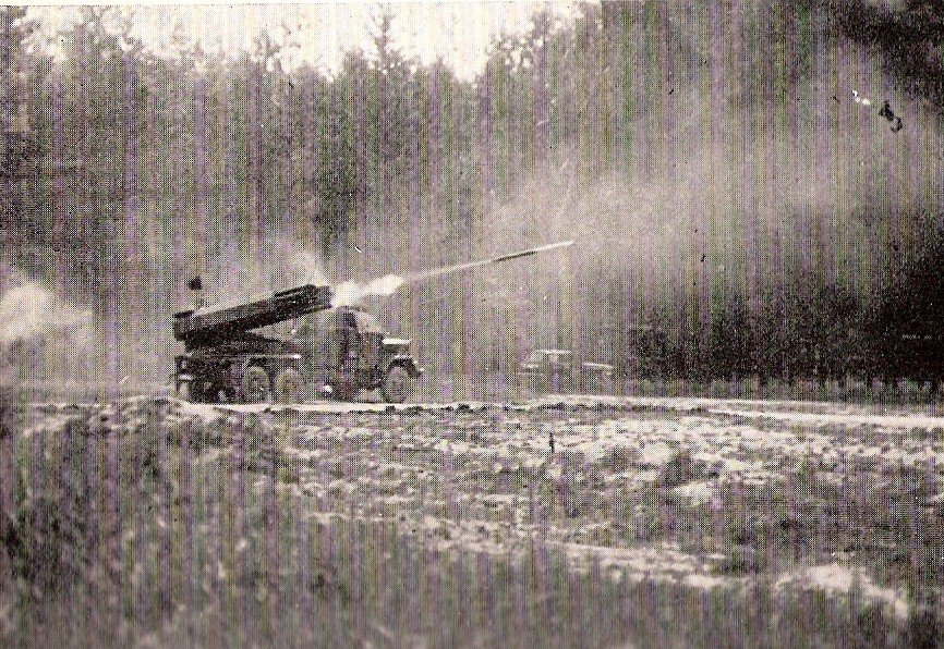 LARS-Schießen